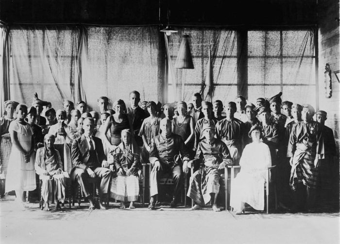 Repronegatief. Installatie van Panembahan Goesti Mohammad van Sekadau